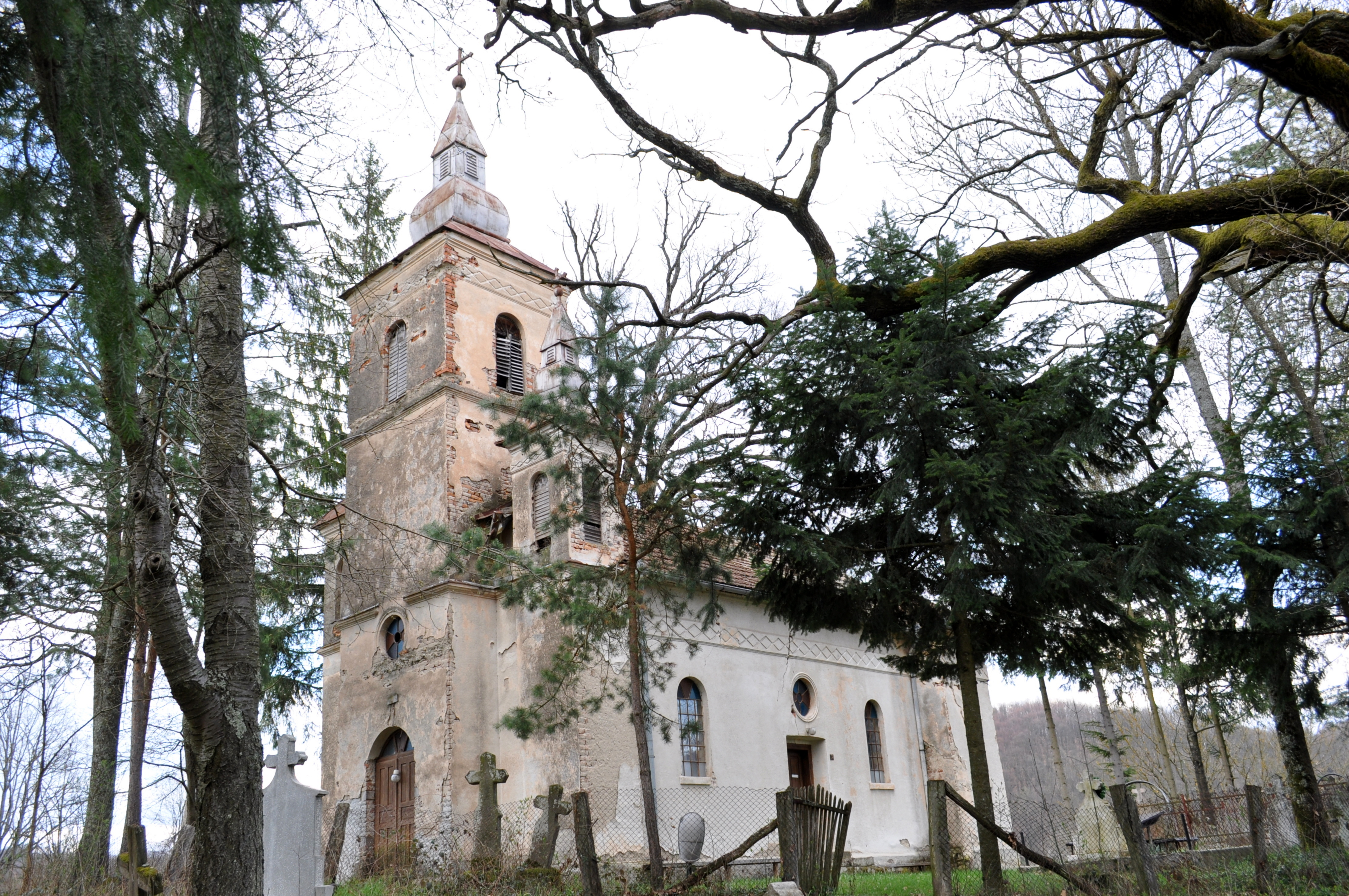 Biserica "Sfinții Arhangheli" , sat LEAUŢ; comuna TOMEŞTI, județul Hunedoara